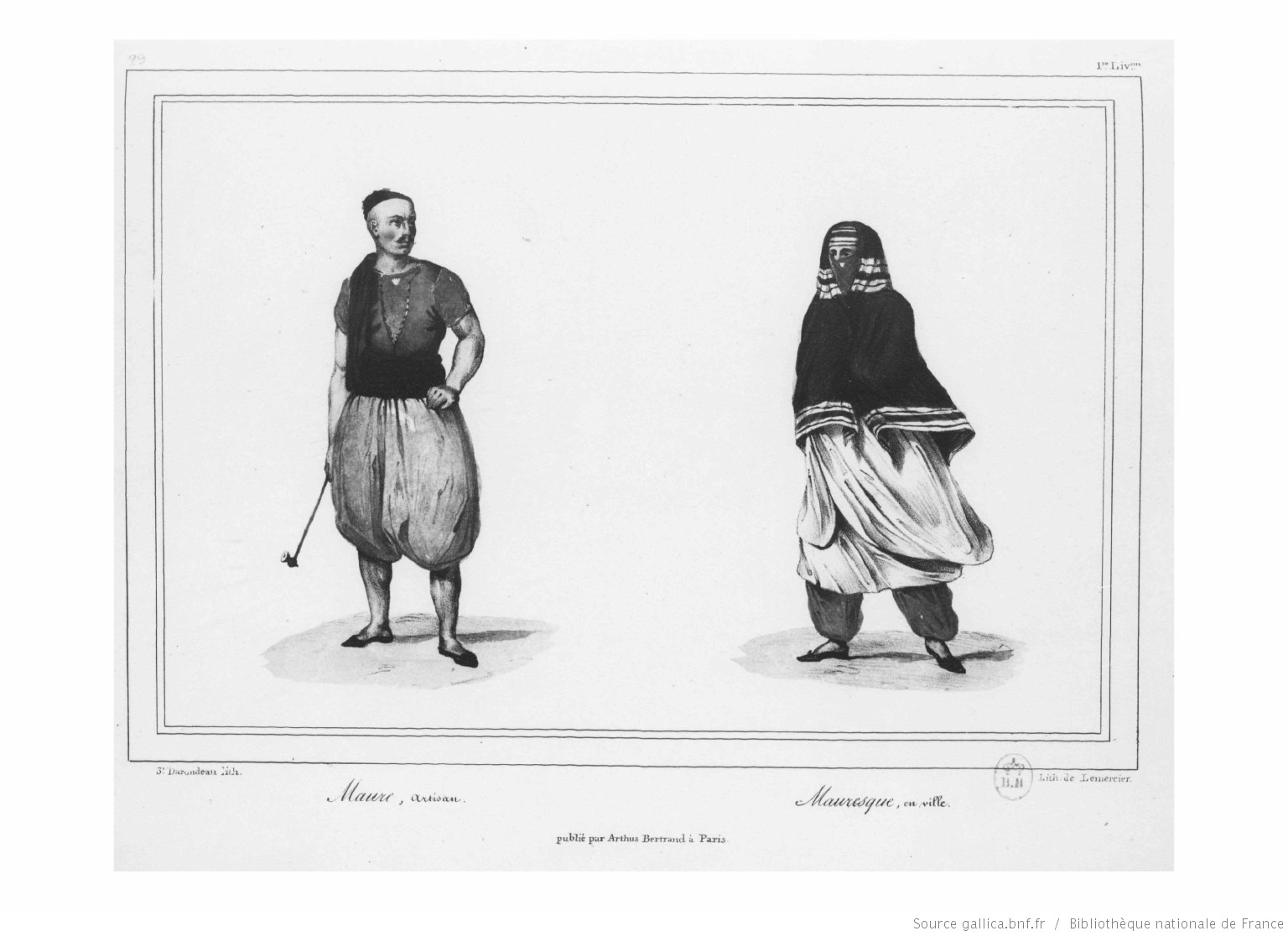 Titre : Voyage dans la régence d'Alger, ou Description du pays occupé par l'armée française en Afrique : contenant des observations sur la géographie physique, la géologie, la météorologie,... : suivies de détails sur le commerce l'agriculture, les sicences et les arts, les moeurs,.... Atlas / par M. Rozet,... Auteur : Rozet, Claude-Antoine (1798-1858) Éditeur : A. Bertrand (Paris) Date d'édition : 1833 Sujet : France -- Colonies -- Afrique Sujet : Afrique du Nord -- Descriptions et voyages -- 19e siècle Type : monographie imprimée Langue : Français Format : 3 t. et 1 atlas : carte ; in-8 et in-fol. (atlas) Format : application/pdf Droits : domaine public Identifiant : ark:/12148/bpt6k106605k Source : Bibliothèque nationale de France, département Philosophie, histoire, sciences de l'homme, 8-Lk8-36 (atlas) Relation : Notice d'ensemble : Relation : Provenance : bnf.fr